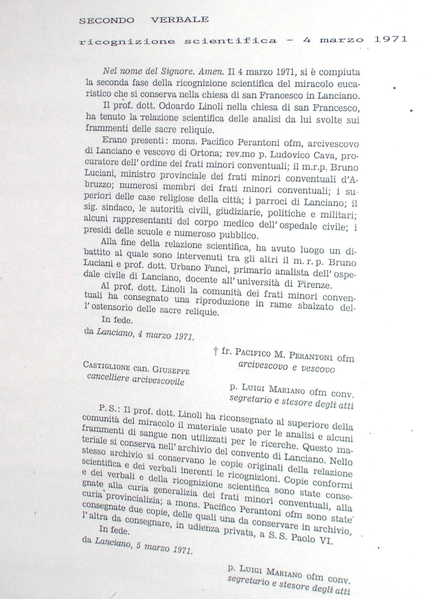 Eucharistic Miracle of Lanciano - public documentation - ricognizione scientifica - 4 marzo 1971.JPG Made by myself. The panel is public for all visitors.